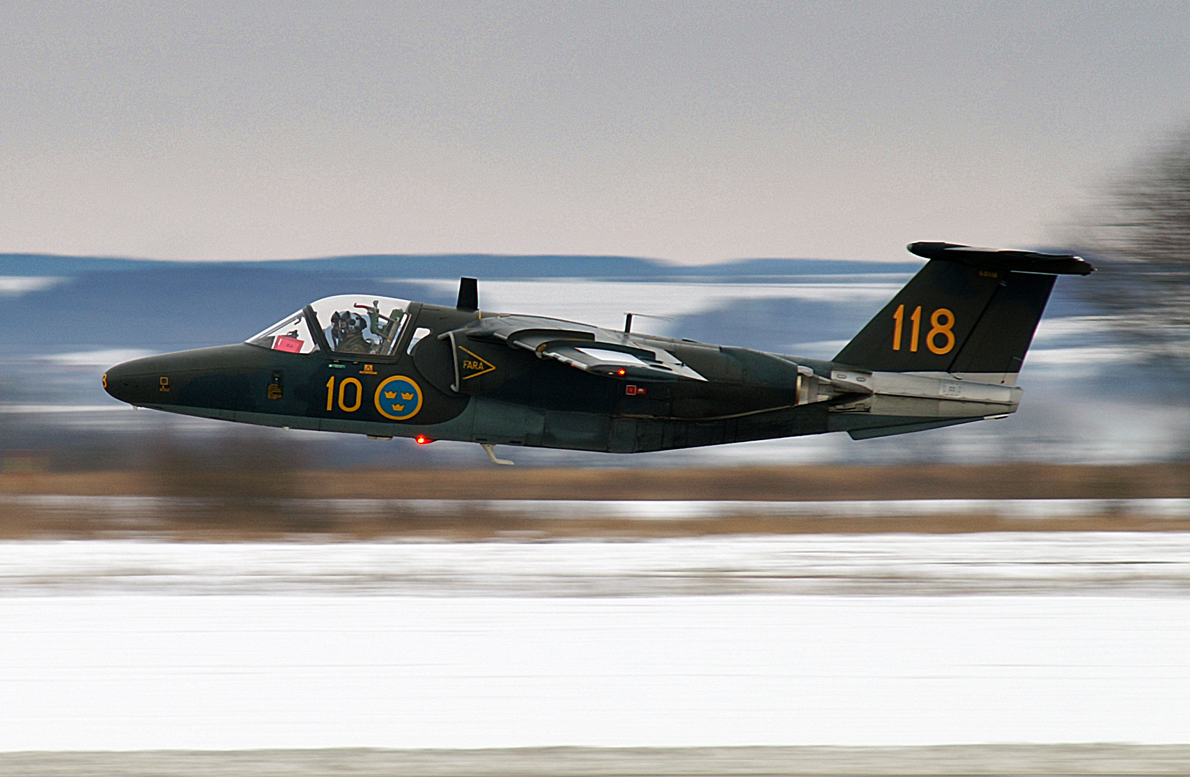 Saab 105 även känd som Sk 60, här märkt F 10-118